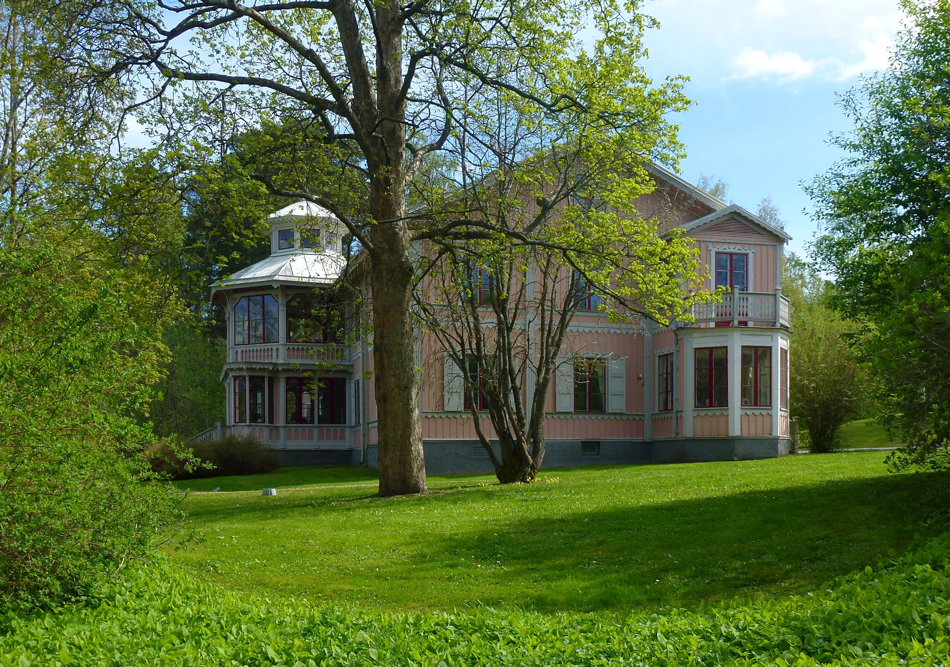 Sköntorp Ulriksdal